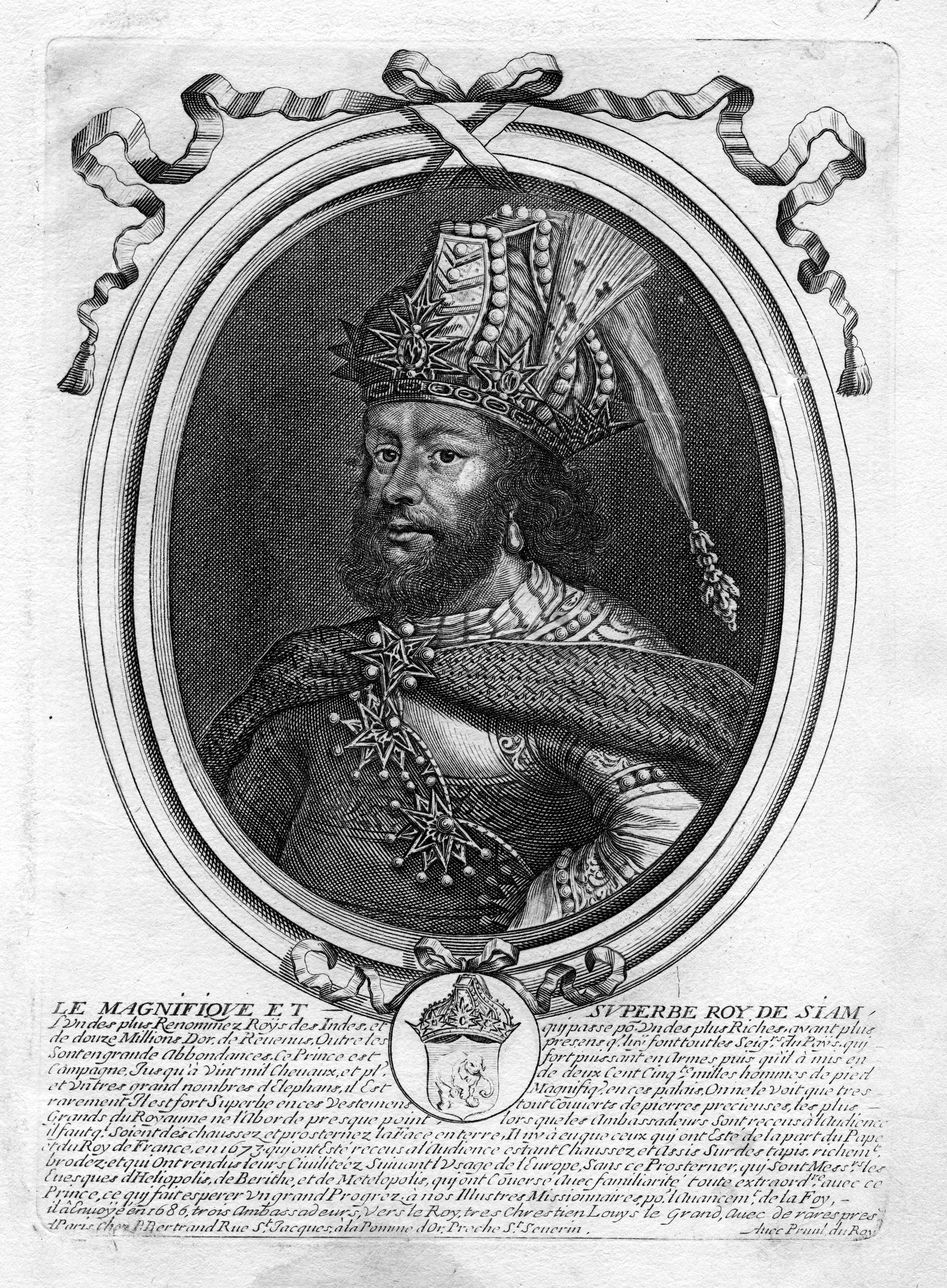 portrait gravé